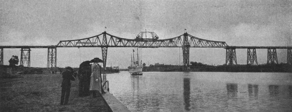 Die Rendsburger Hochbrücke wenige Wochen vor ihrer Fertigstellung 1913.